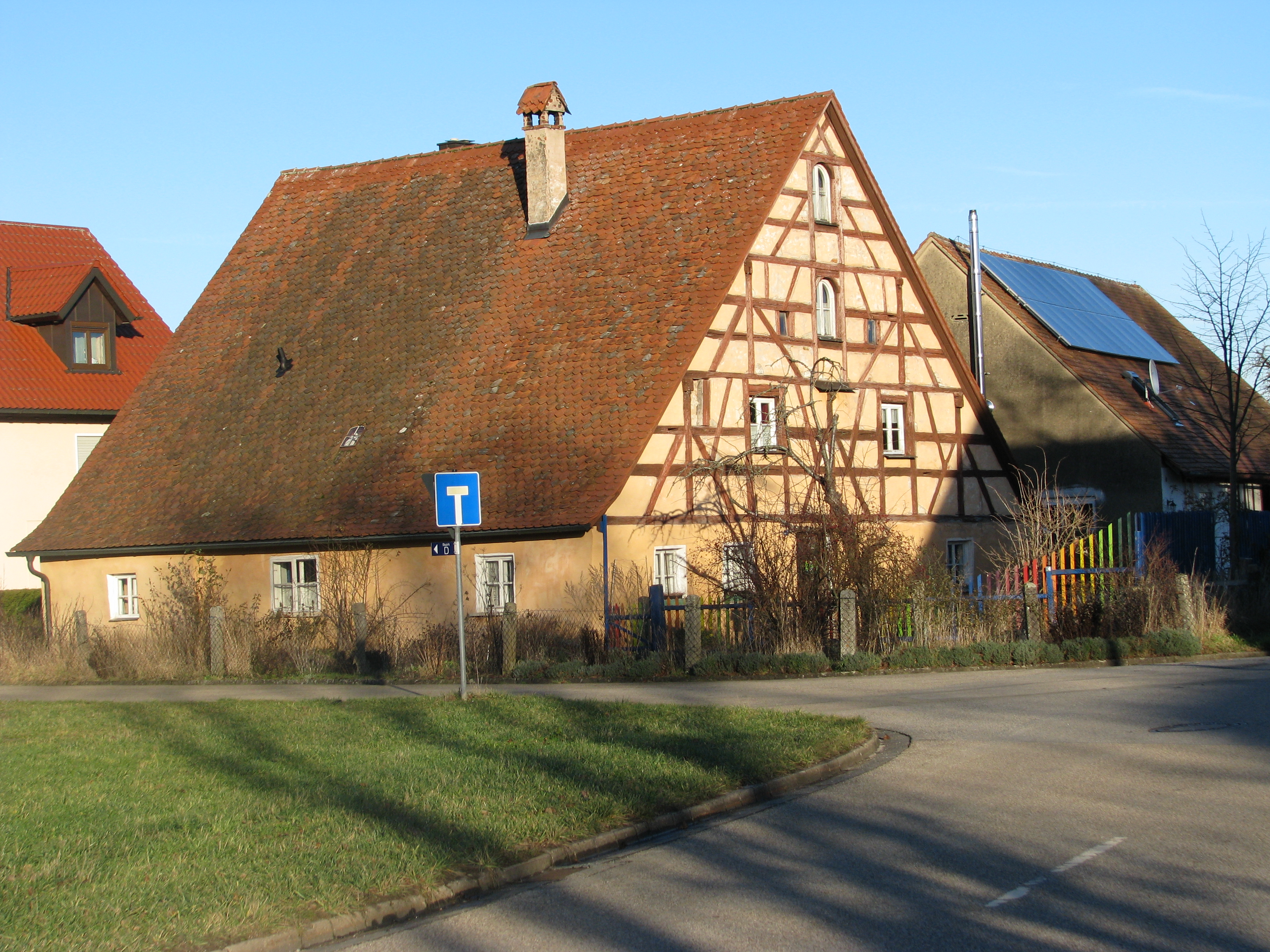 Weinsfeld, Ortsteil von Hilpoltstein im mittelfränkischen Landkreis Roth, Wohnstallhaus mit Fachwerkgiebel